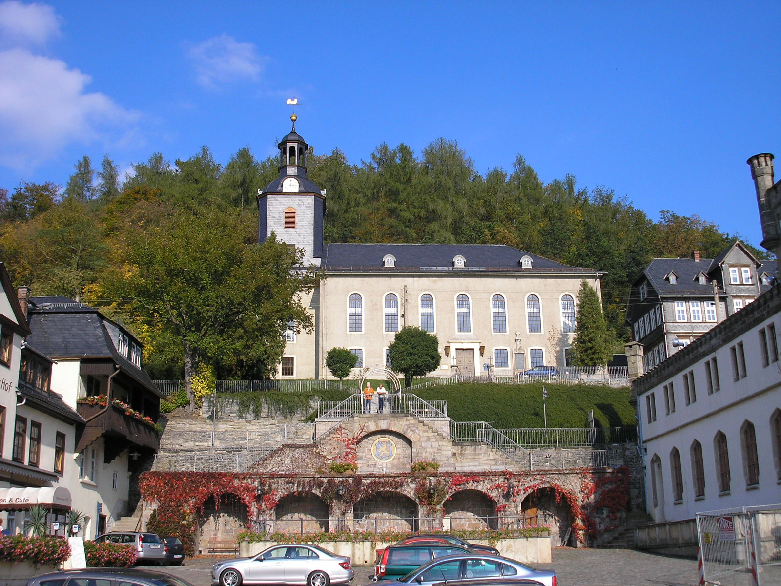 Die Stadtkirche in Leutenberg (Thüringen).